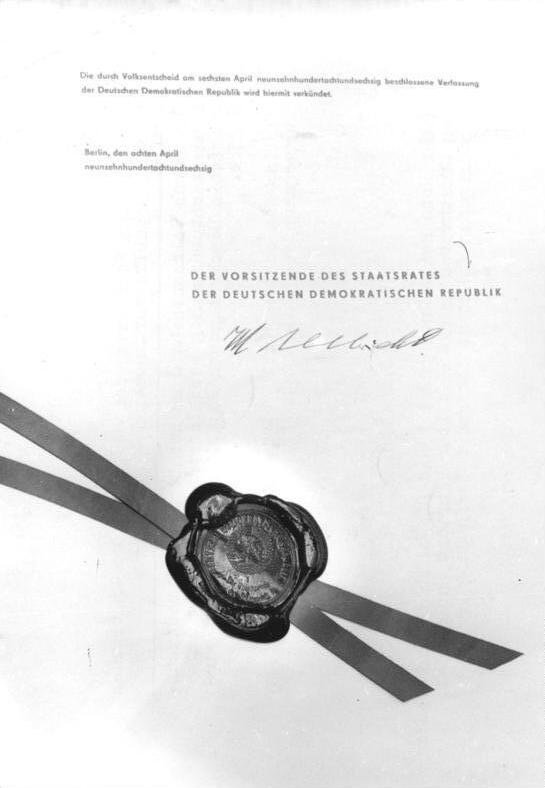 Zentralbild Hesse 9.4.1968 (bi) Berlin: Neue Verfassung der Deutschen Demokratischen Republik verkündet. Die durch Voksentscheid am sechsten April neunzehnhundertachtundsechzig beschlossene Verfassung der Deutschen Demokratischen Republik wird hiermit verkündet. Berlin, den achten April neunzehnhundertachtungdsechzig. Der Vorsitzende des Staatsrates der Deutschen Demokratischen Republik. Unser Foto zeigt Unterschrift und Siegel des Vorsitzenden des Staatsrates der DDR, Walter Ulbricht, unter dem historischen Dokument der neuen Verfassung.